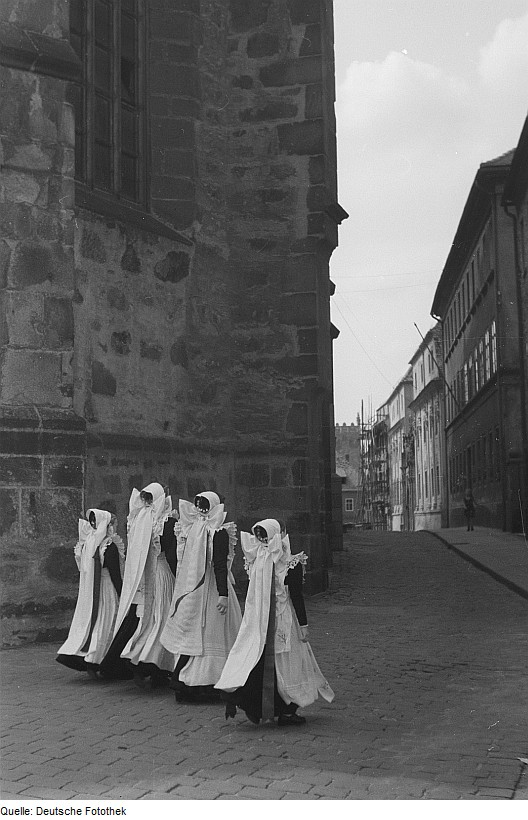 Original image description from the Deutsche Fotothek Vier Sorbinnen neben dem Bautzener Dom